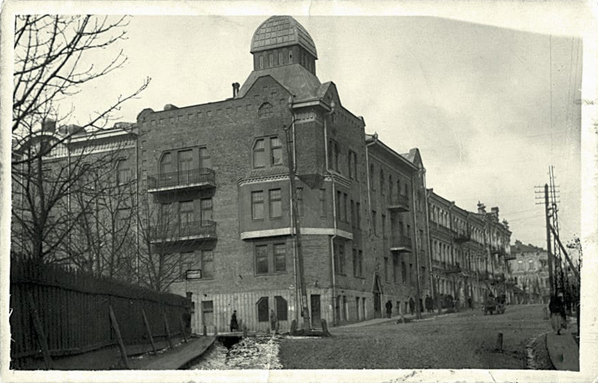 Беларуская (тарашкевіца): Менск (Miensk), вуліца Лошыцкая (vulica Łošyckaja) каля скрыжаваньня з Магазыннай (vulica Magazynnaja). Управа Лібава-Роменскай чыгункі